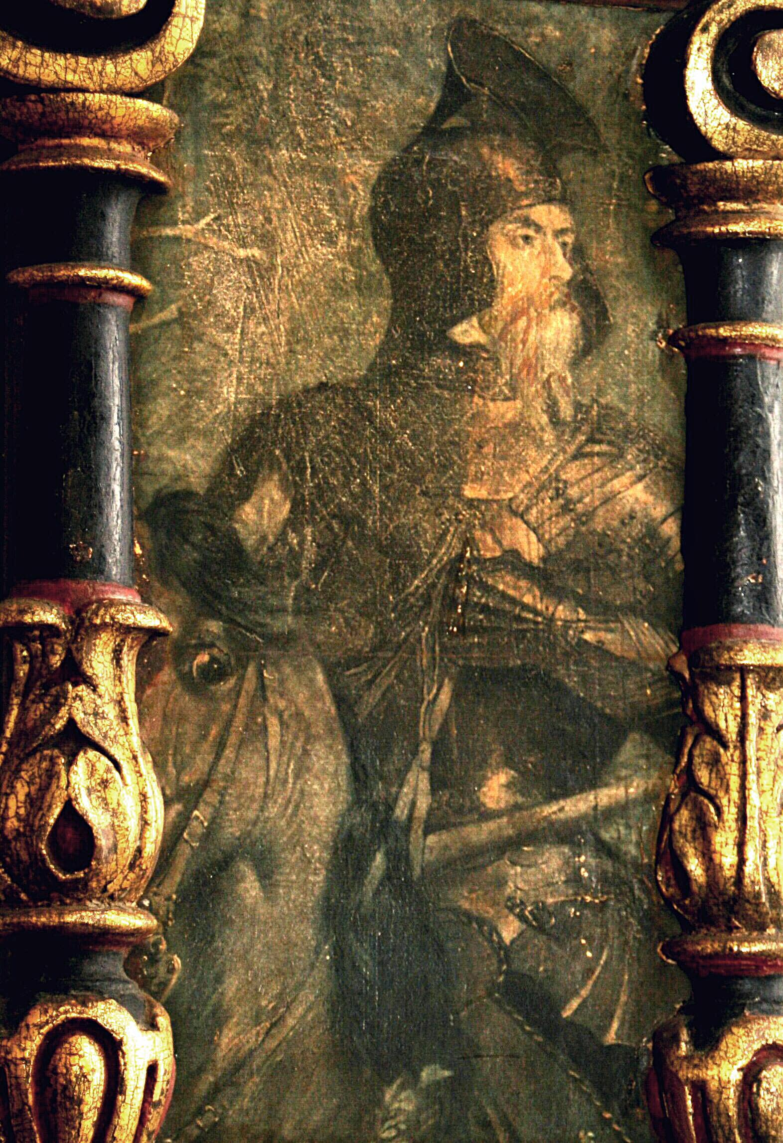 Gemälde in der Christuskirche in Absberg. Öl auf Leinwand